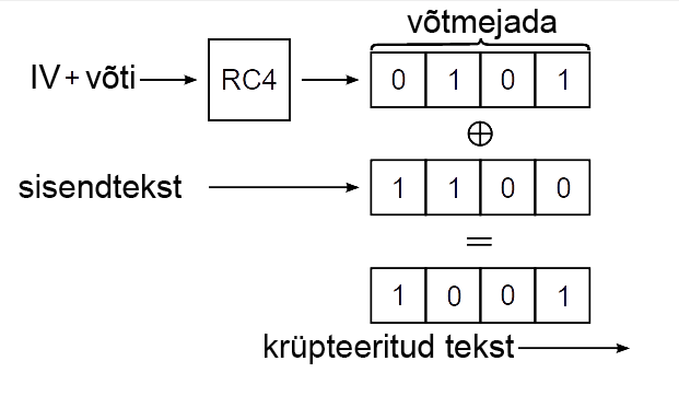 Lihtne näide WEPi krüpteeringust: RC4võtmejada ja krüpteeritava teksti liitmise tulemus välistava disjunktsiooni abil (XOR)